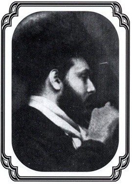 האדמו"ר האחרון בקומרנה שנספה בשואה